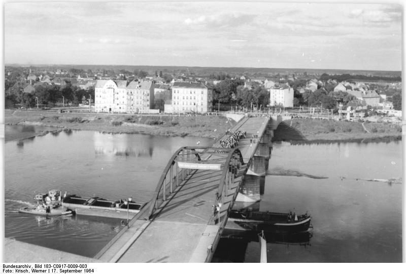 Frankfurt/Oder, Friedensbrücke Zentralbild Krisch trc-Schü 17.9.1964 Seit Gründung der DDR wurden in Frankfurt-Oder rund 5000 neue Wohnungen errichtet. Die Stadt war im 2. Weltkrieg zu mehr als zwei Drittel zerstört worden. Heute blickt man auf die großzügig im modernen Stil wiederentstandene Altstadt (unser Foto zeigt einen Blick vom neuen Hochhaus auf die Friedensbrücke) an der Oder.